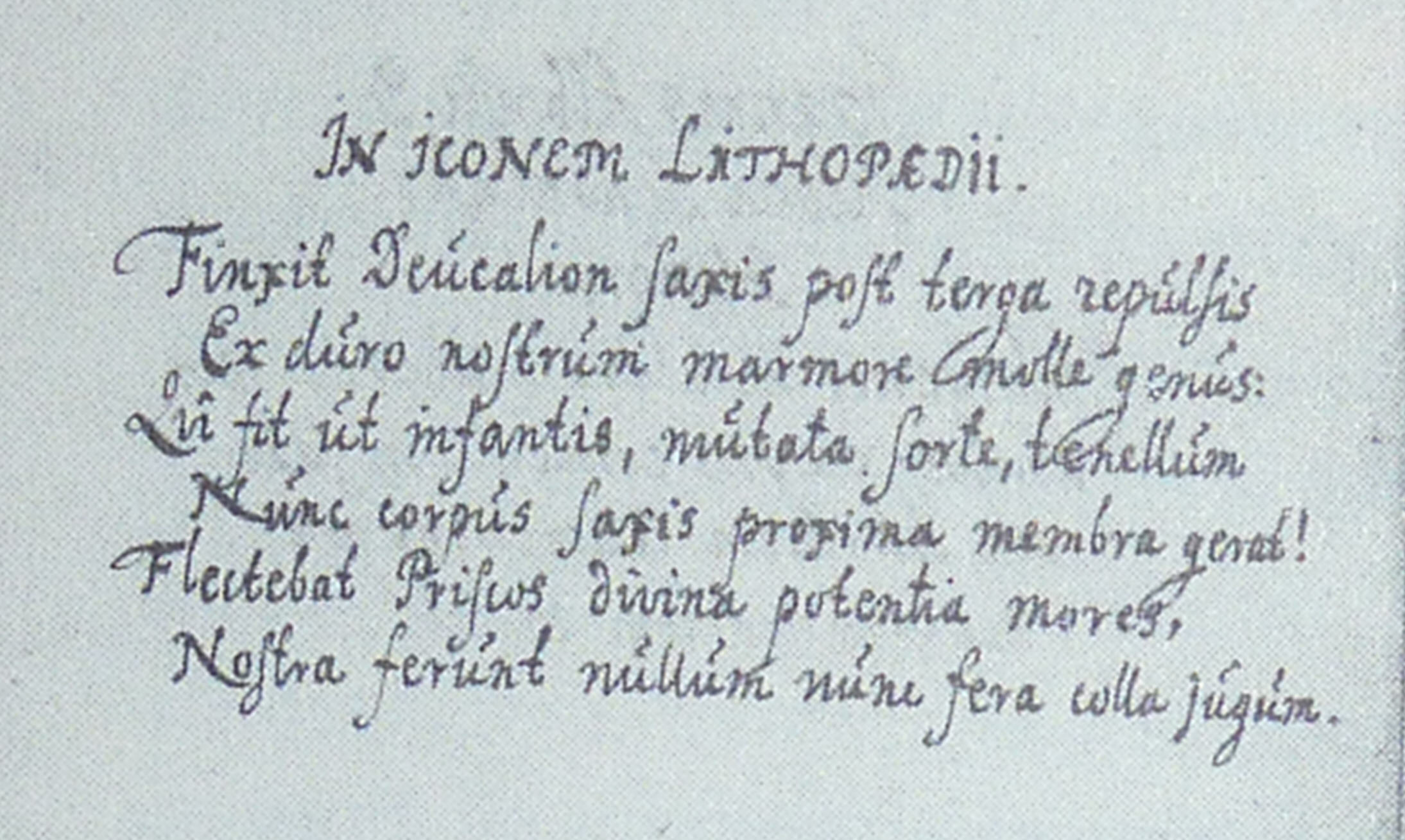 Gedicht auf das Steinkind von Sens